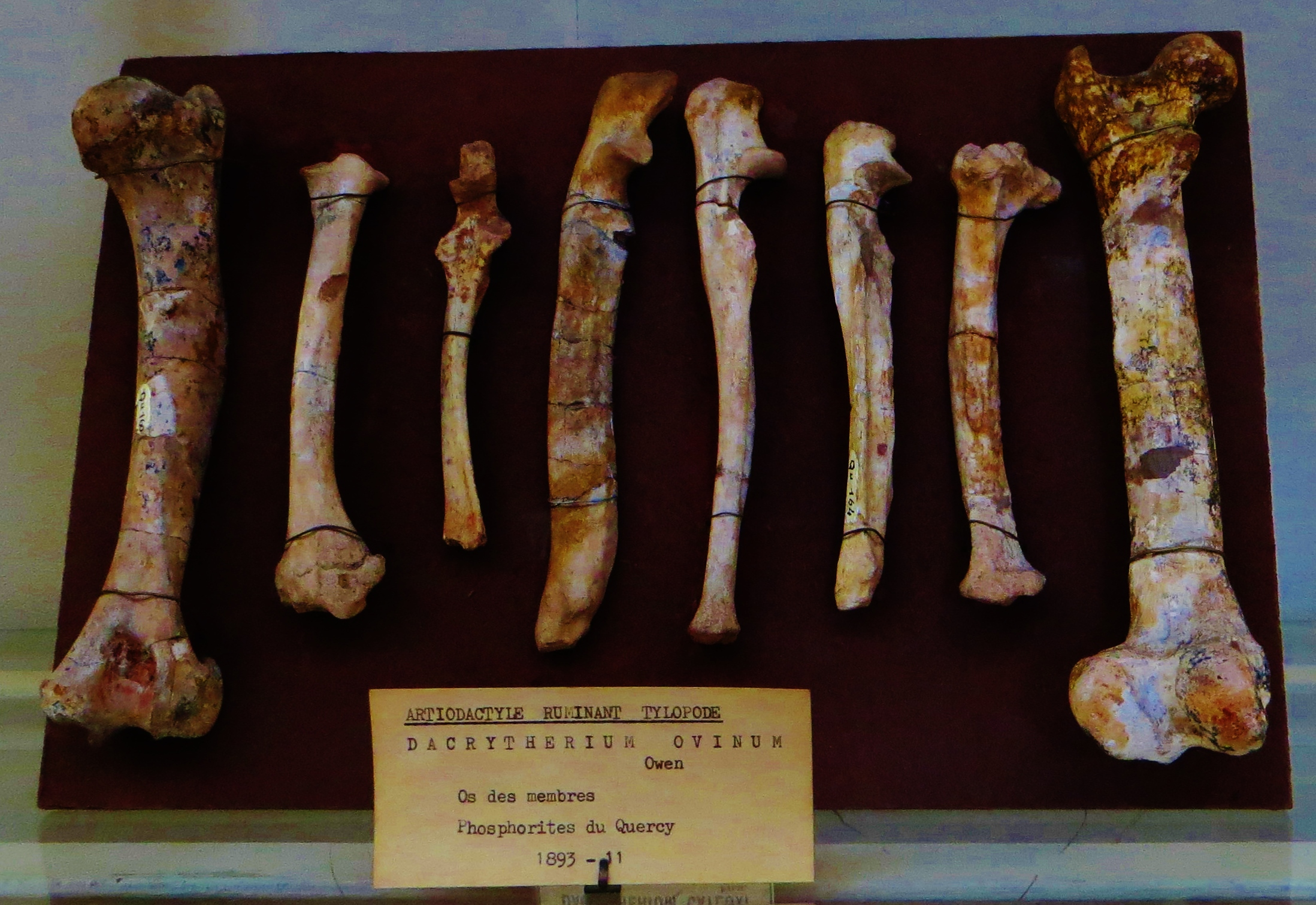 Fossil of Dacrytherium, an extinct mammal - Took the photo at Musee d'Histoire Naturelle, Paris